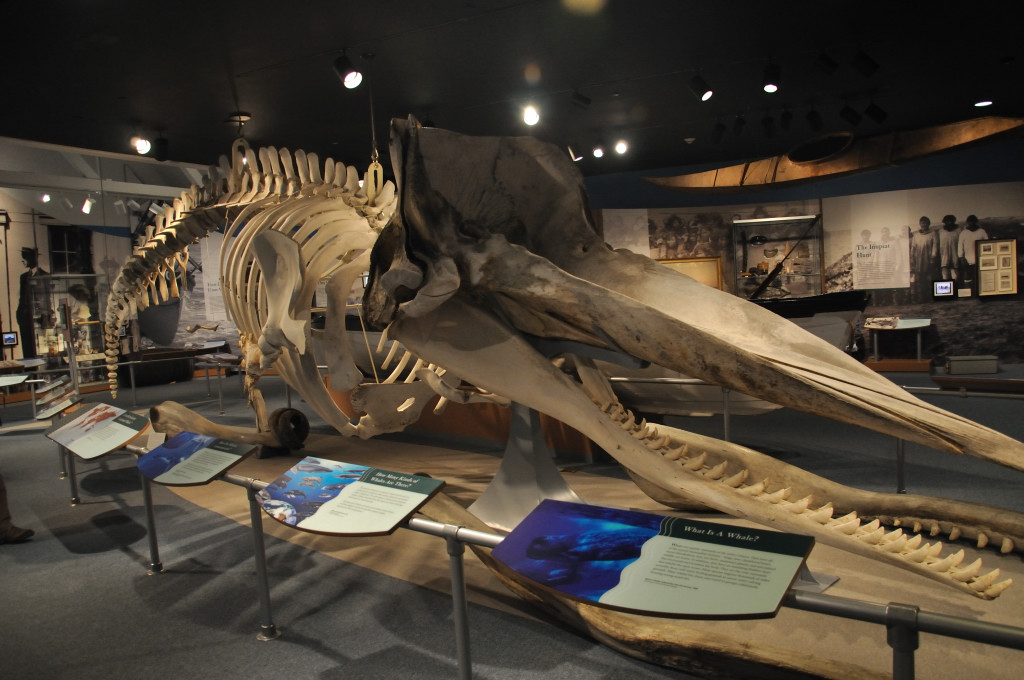 Skeleton of sperm whale in Oxford, Fairhaven, MA, United States